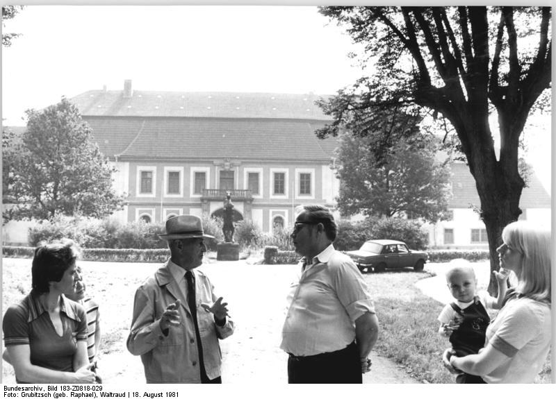 Besuch des Gestüts Graditz ADN-ZB Grubitsch-18.8.81 Bez.Leipzig-Anziehungspunkt für viele Besucher aus allen Teilen der Republik und aus dem Ausland ist das 300 Jahre alte Vollblutpferden. Der 87jährige Rentner Otto Fiebig (3.v.l.) seit seinem 14. Lebensjahr im Gestüt, kennt dessen Geschichte und Geschichtchen wie kein zweiter. Seit einem Jahrzehnt betätigt sich der vitale humorvolle Mann als Fremdenführer und informiert die Besucher über seinen Heimatort. Siehe auch Z 0818-30N und ADN-Meldung